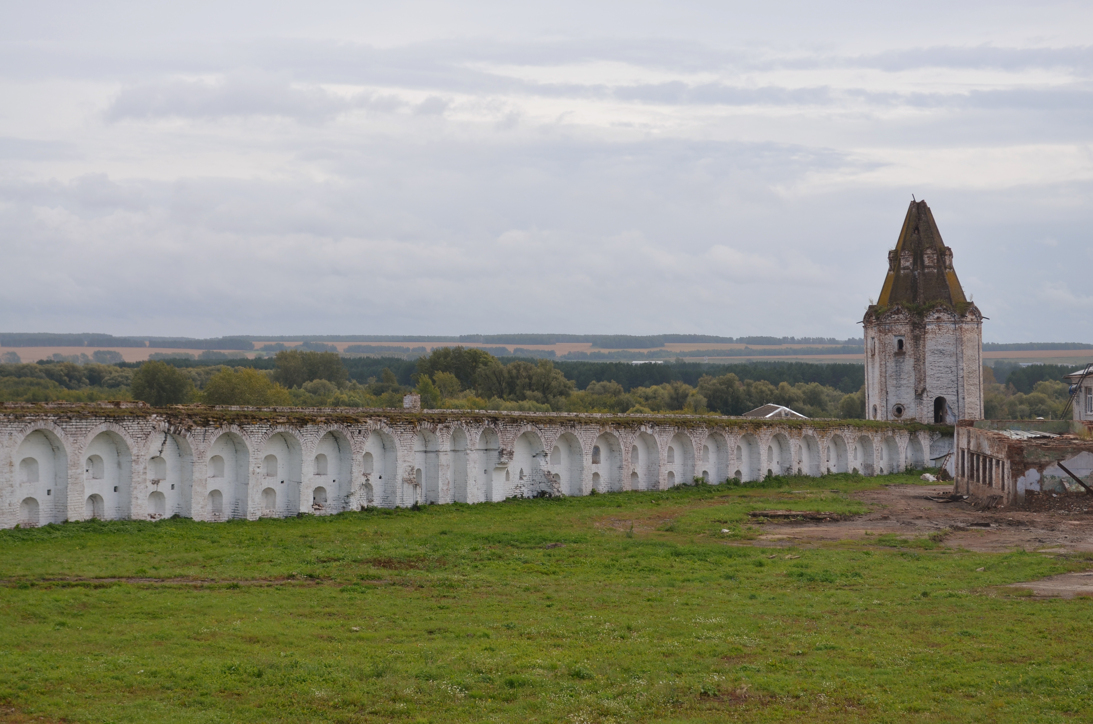 Красный бастион (башня западная) (руины) (Курганская область, Далматово, улица Советская, 63)